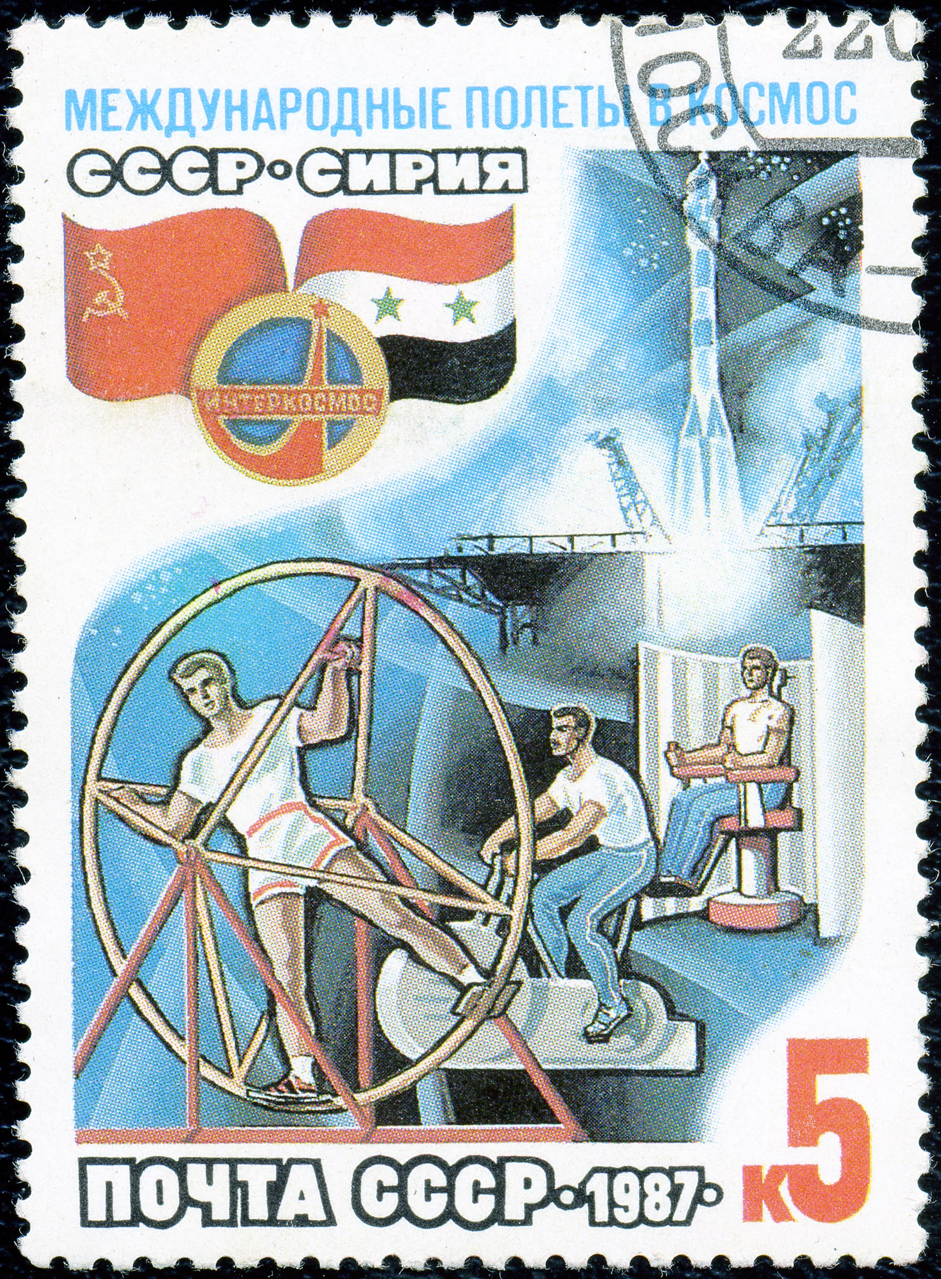 Почтовая марка СССР 1987 года из серии «Совместный советско-сирийский космический полет (22—30.07)». На марке изображены космонавты, участвовавшие в полёте, тренирующиеся в Центре подготовки космонавтов имени Ю. А. Гагарина, запуск космического корабля «Союз ТМ-3» , эмблема «Интеркосмоса». Художник — Ю. Левиновский, тираж — 5 млн экз.